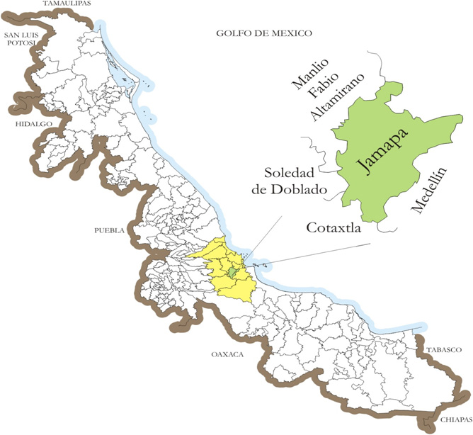 Mapa de colindancias del municipio de Jamapa, Ver.